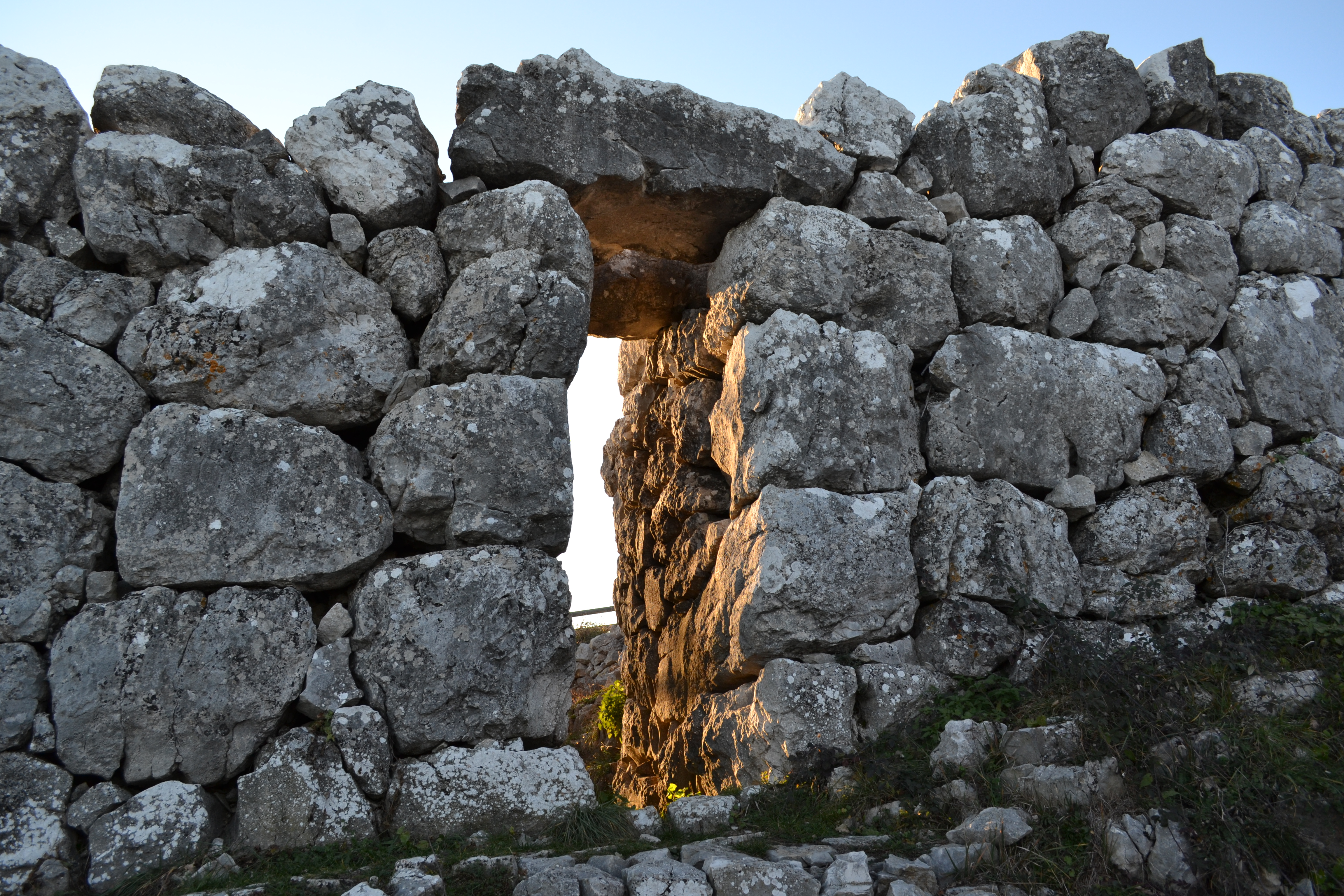 Resti delle mura difensive della città di Pallanum